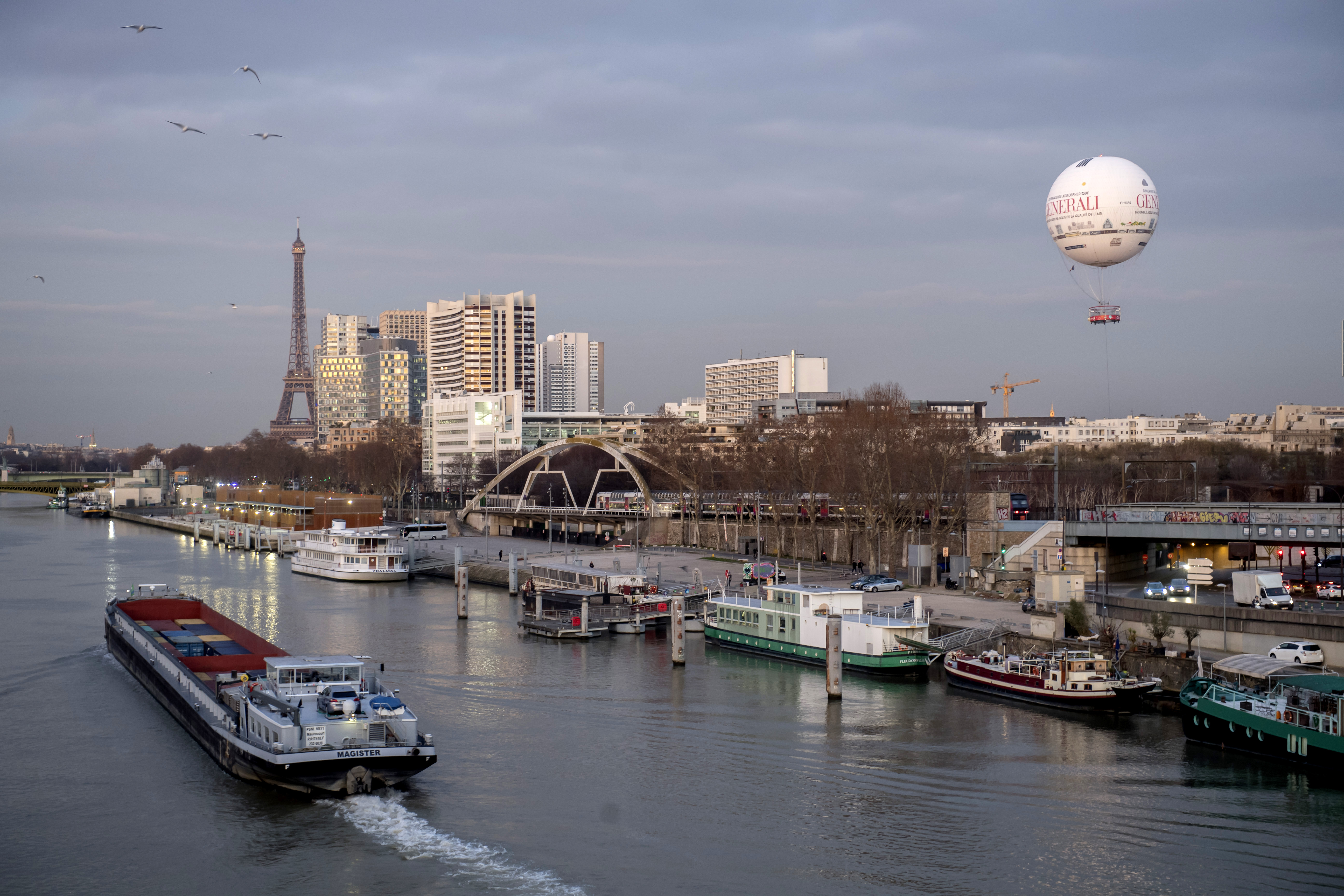 Le Ballon de Paris flotte au-dessus de la capitale.